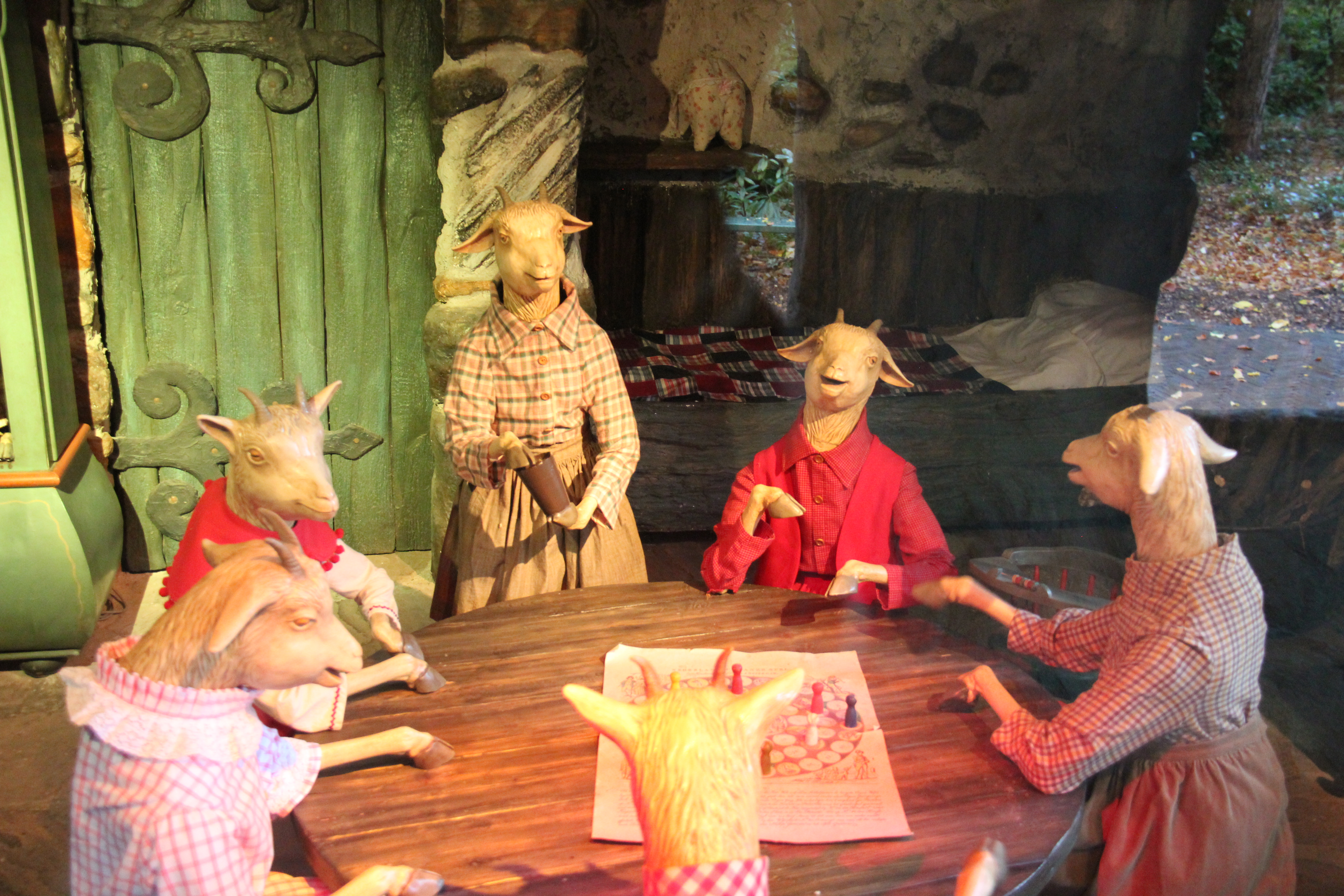 Représentation du conte Le loup et les sept chevreaux dans le Bois des contes à Efteling.